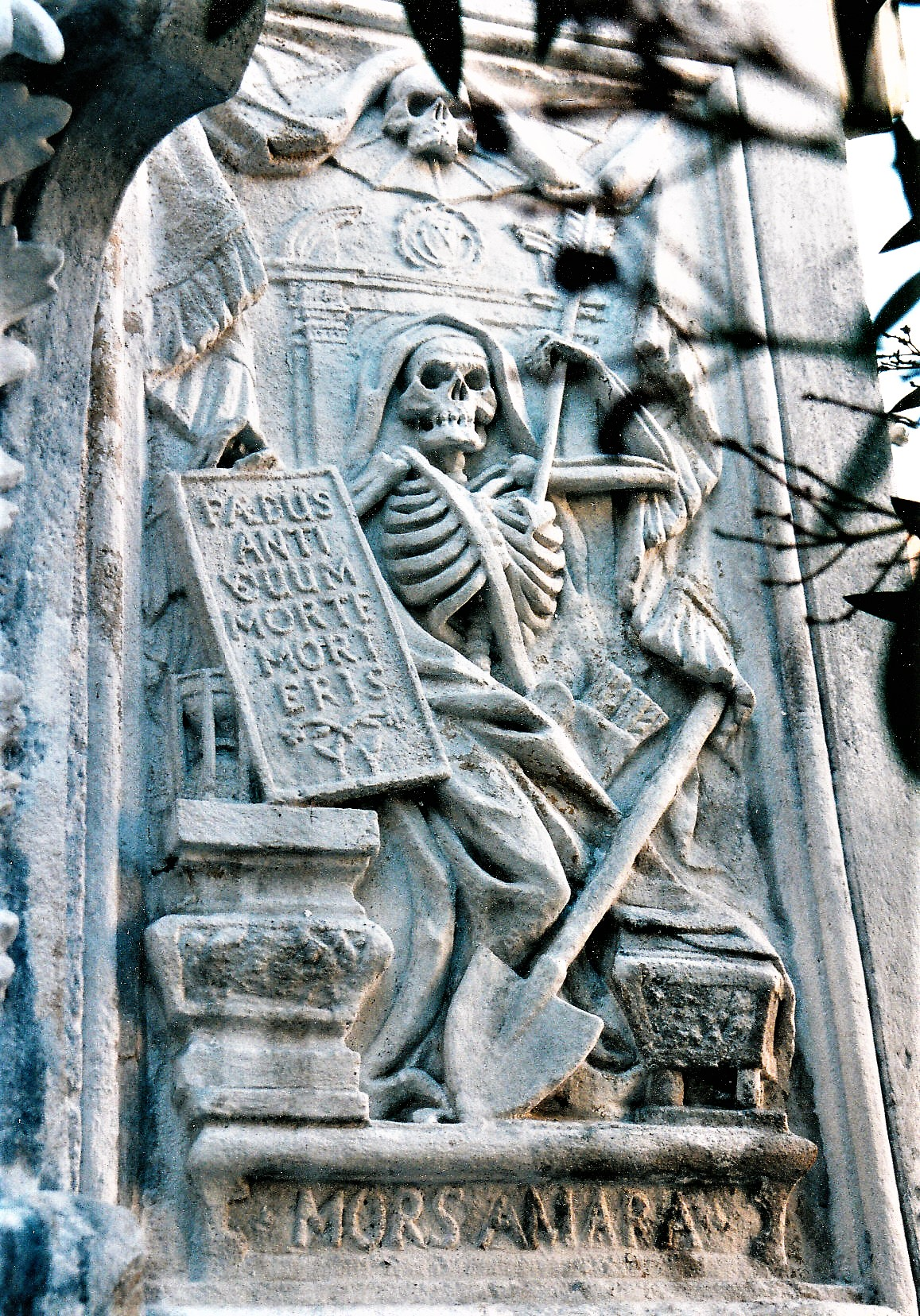 Stift Dürnstein - 4 letzte Dinge: Tod